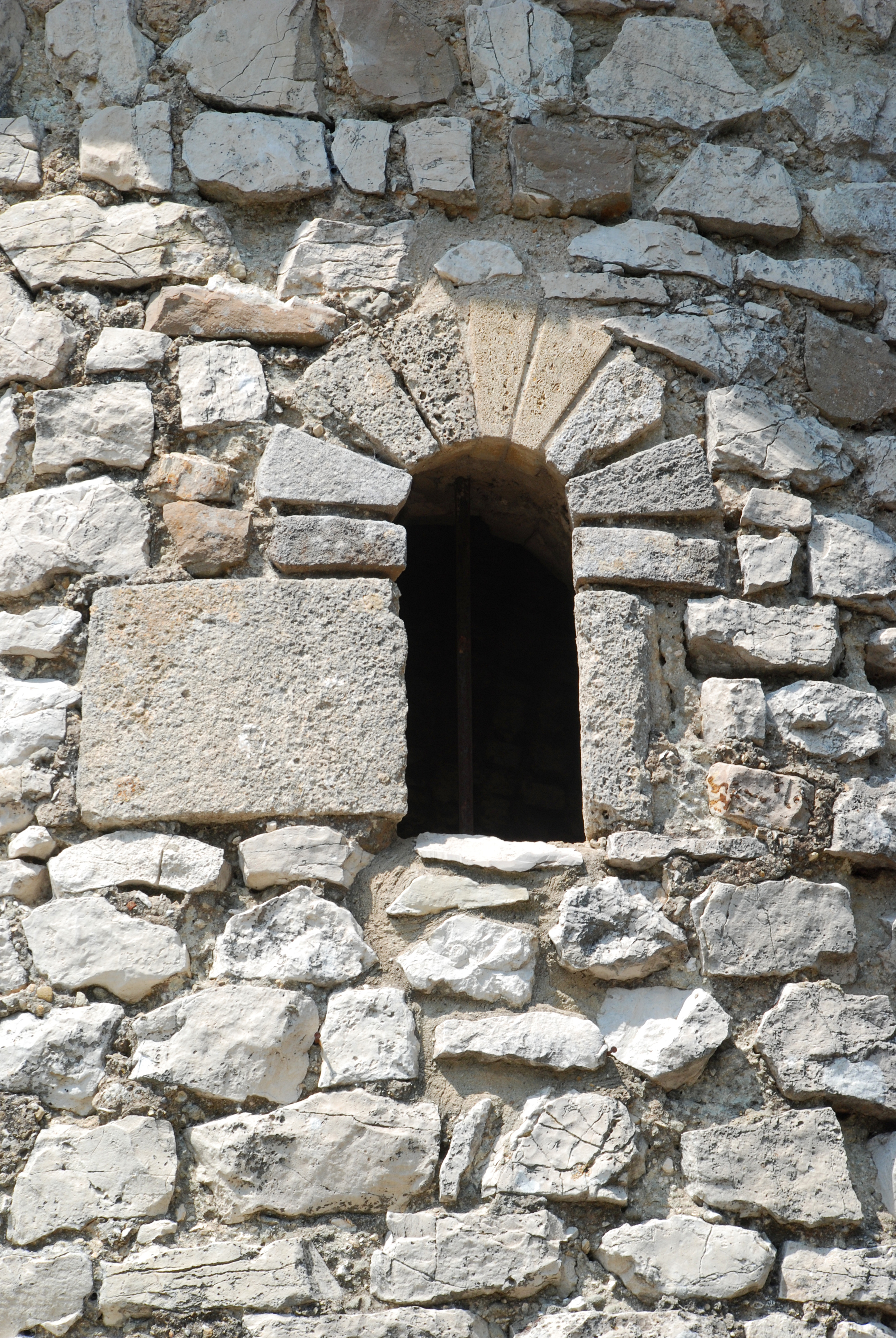 France - Provence - Vaucluse - Le Thor - Chapelle Saint-Pierre de Thouzon